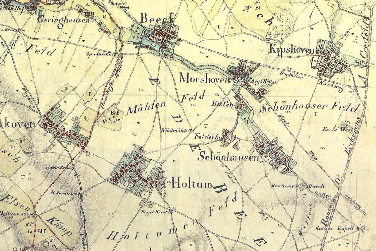 Tranchotkarte Nr. 48 Wegberg (Ausschnitt)